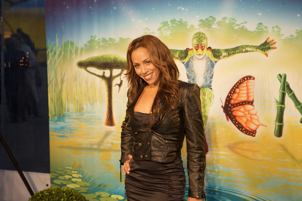 Glennis Grace bij de Europese première Cirque du Soleil in Amsterdam